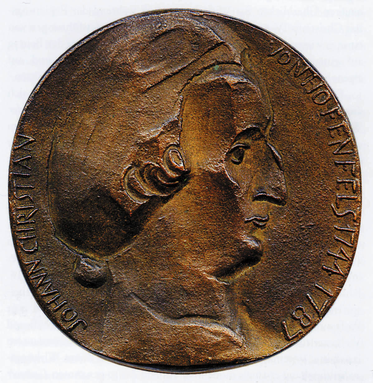 Ansicht der Vorderseite der Hofenfels-Medaille